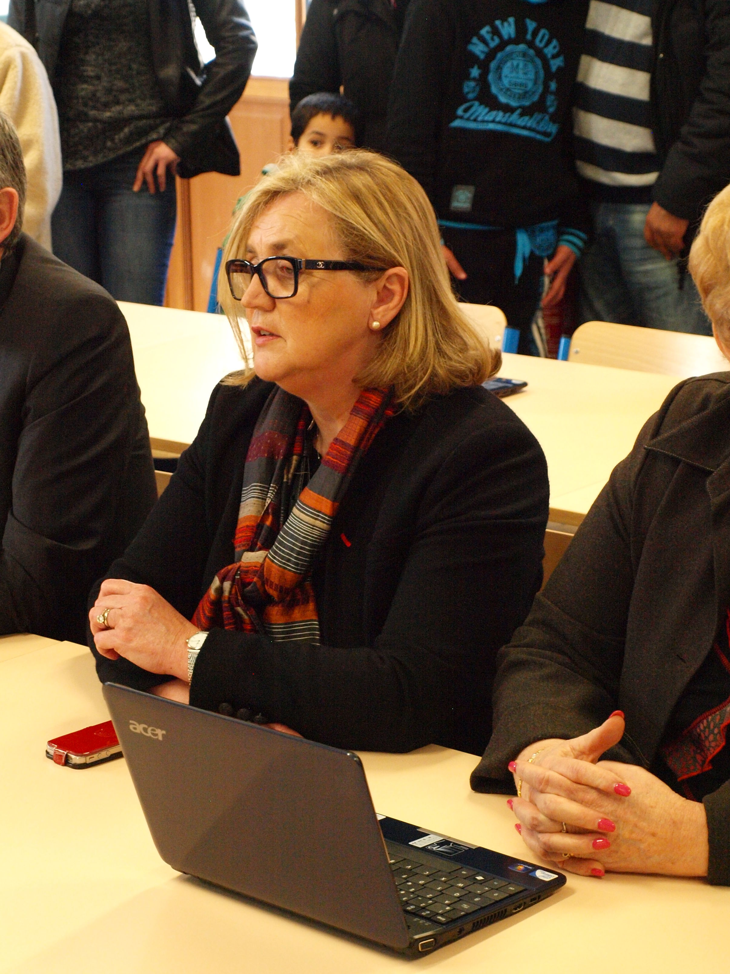 Villemanoche (Yonne, France) ; inauguration de l'extension de l'école communale ; la députée.